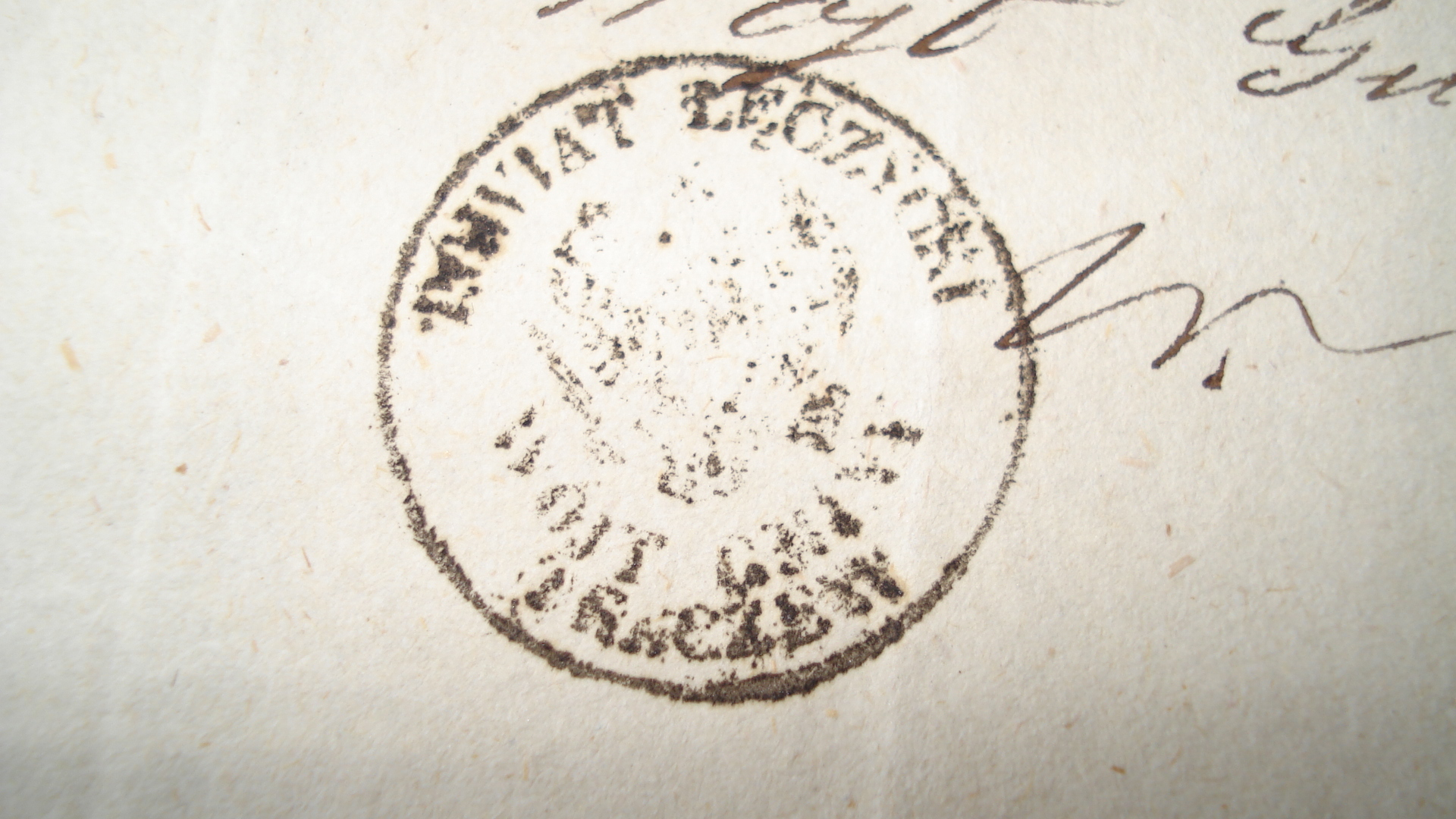 Pieczęć urzędowa wójta Gminy Tkaczew z powiatu łęczyckiego (1835 r.)